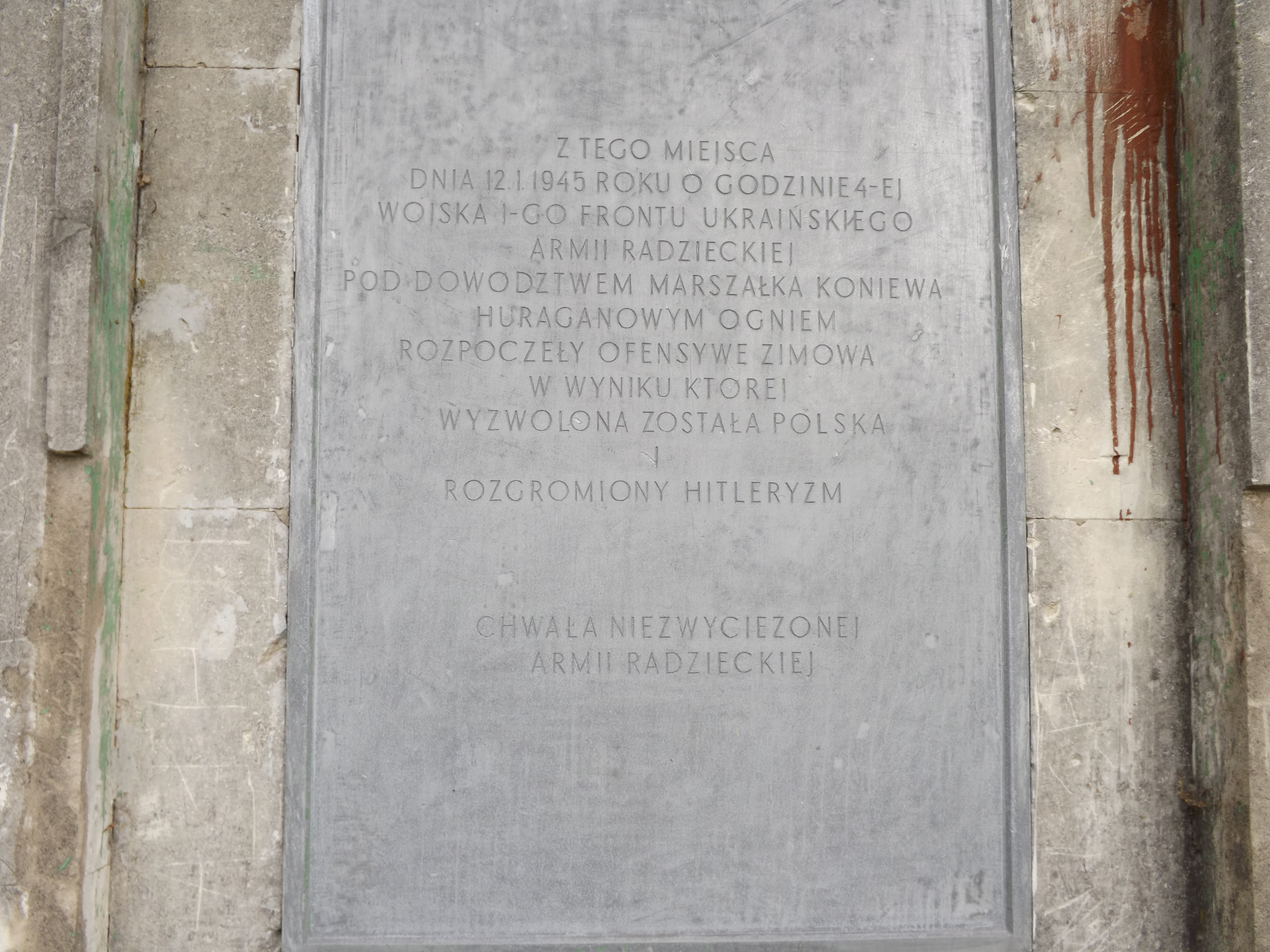 Tablica upamiętniająca ofensywę Armii Czerwonej przeprowadzoną z przyczółka baranowsko-sandomierskiego